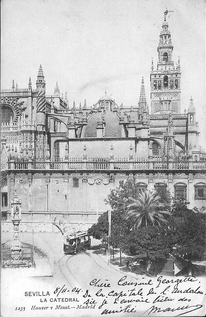 Tram bij de kathedraal van Sevilla in 1904